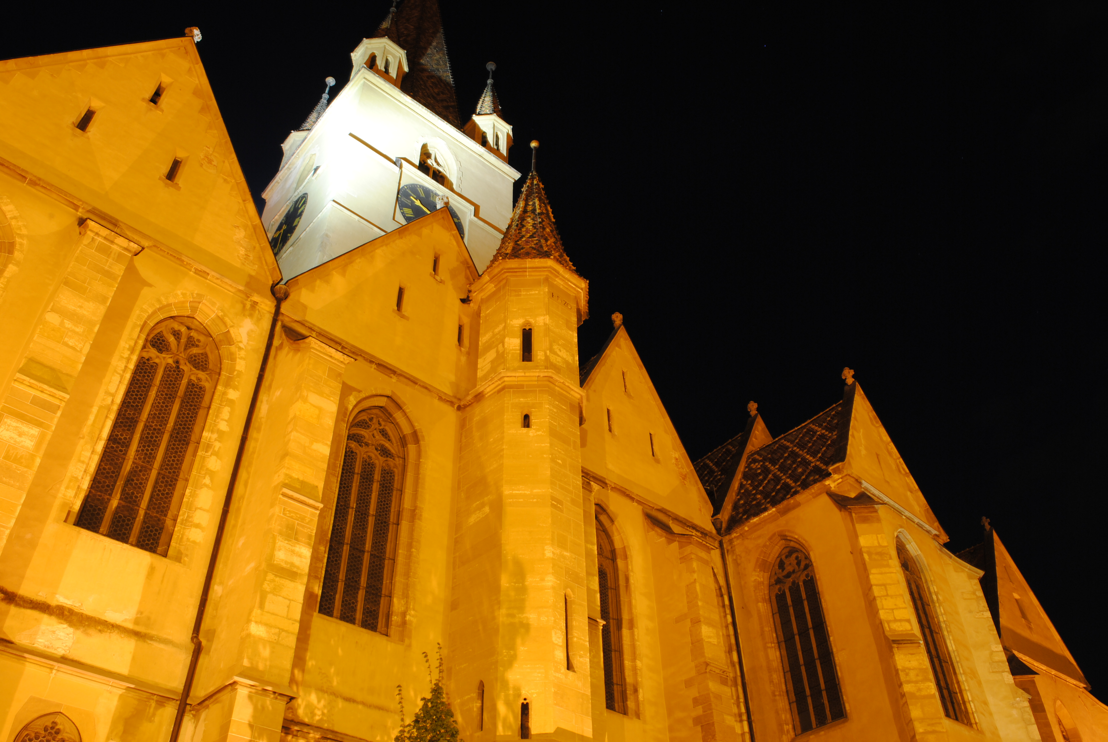 Catedrala Evanghelică din Sibiu, fotografie nocturna